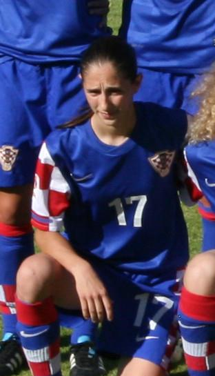 Izabela Lojna